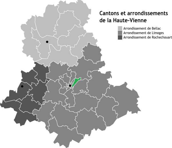 Canton de Limoges-Le Palais, Limousin, France en Carte des arrondissements de la Haute-Vienne